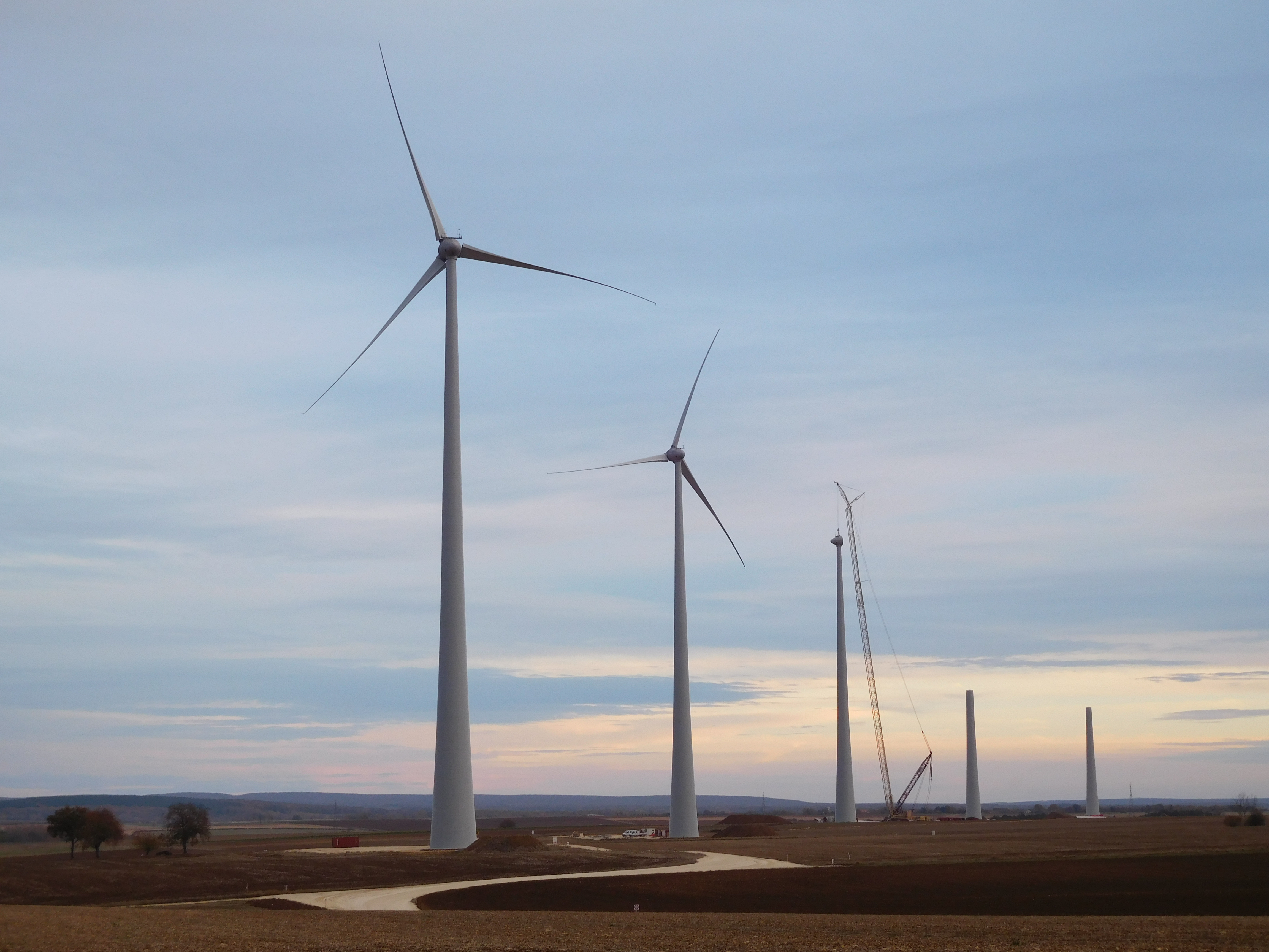 De gauche à droite : éoliennes Enercon E-103 n° 8 à 12. Grue Terex Superlift 3800. Pougny (Nièvre, France).